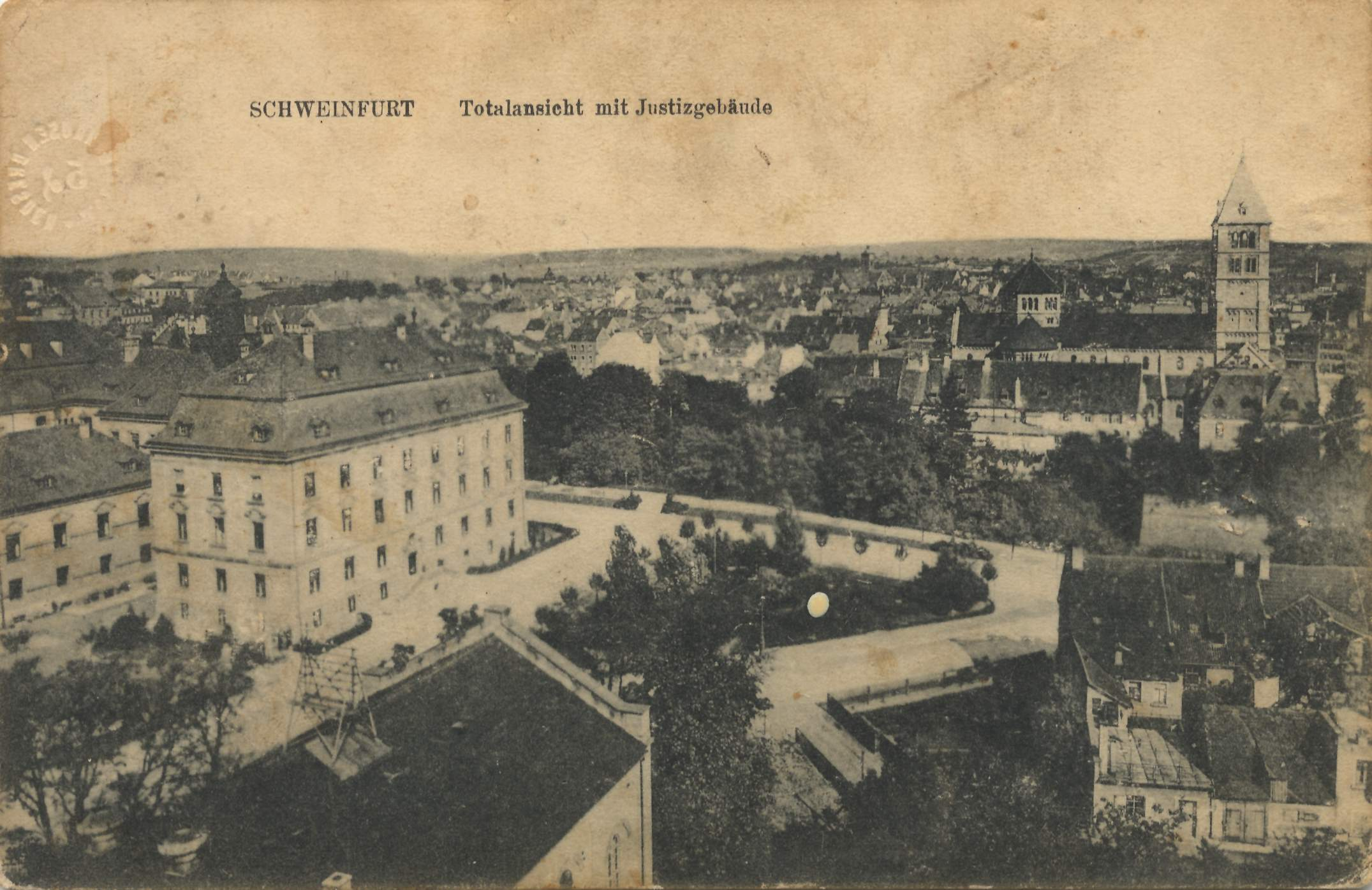 Stadtansicht mit Justizgebäude